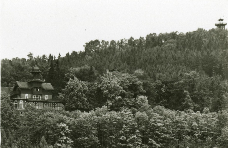 Löbau; Berghotel Honigbrunnen auf dem Löbauer Berg This postcard is from publisher Brück & Sohn in Meißen ( postcard has a unique number 25744 and is available in a higher resolution at the publisher. This images was uploaded in a cooperation project between Wikipedians and the publisher.